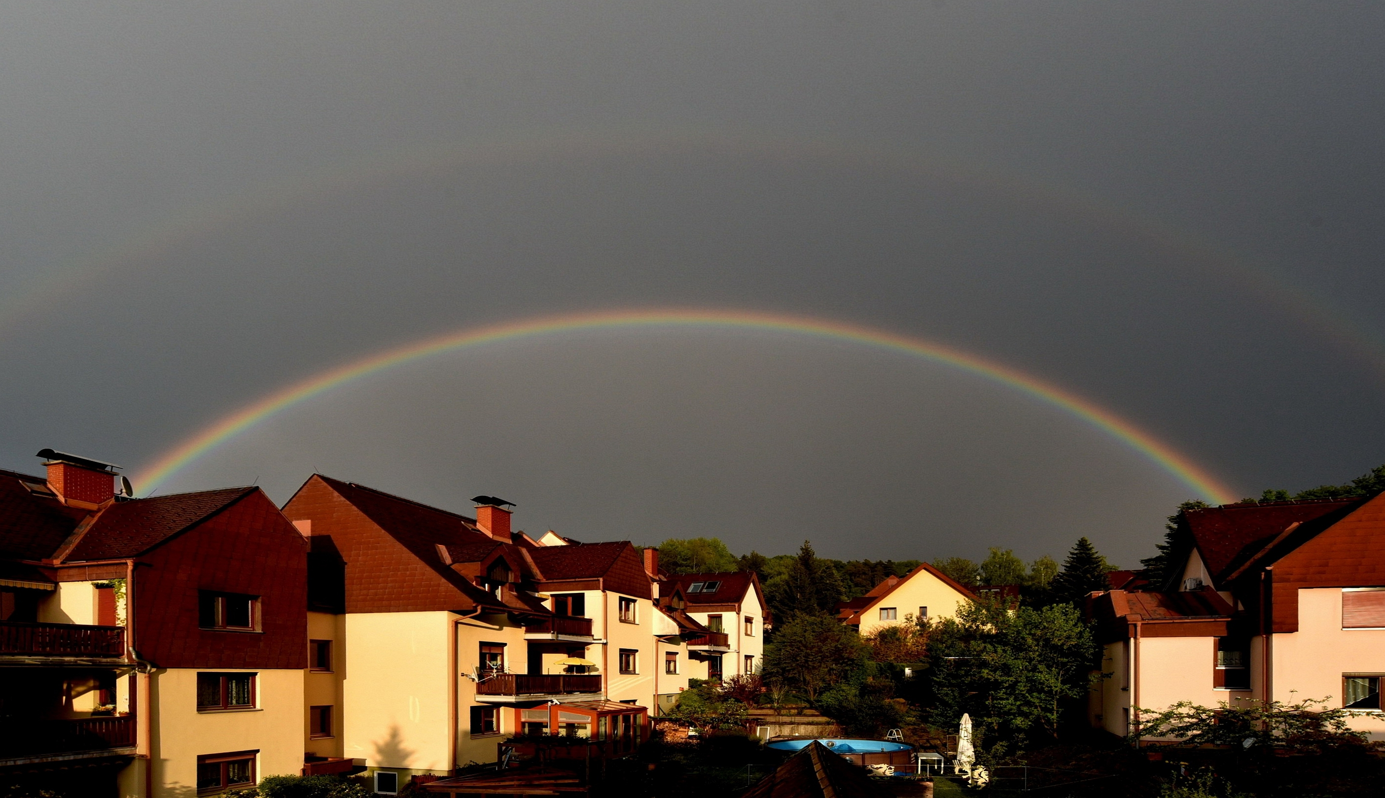 Doppelregenbogen, Graz, Österreich, 27. April 2020